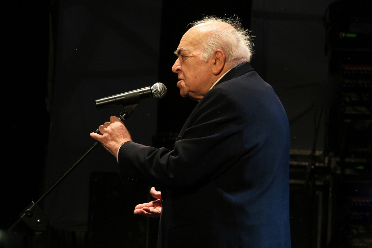 Fue este un encuentro generacional con dos referentes fundamentales de las décadas doradas: Alberto Podestá y…( Foto: Estrella Herrera)